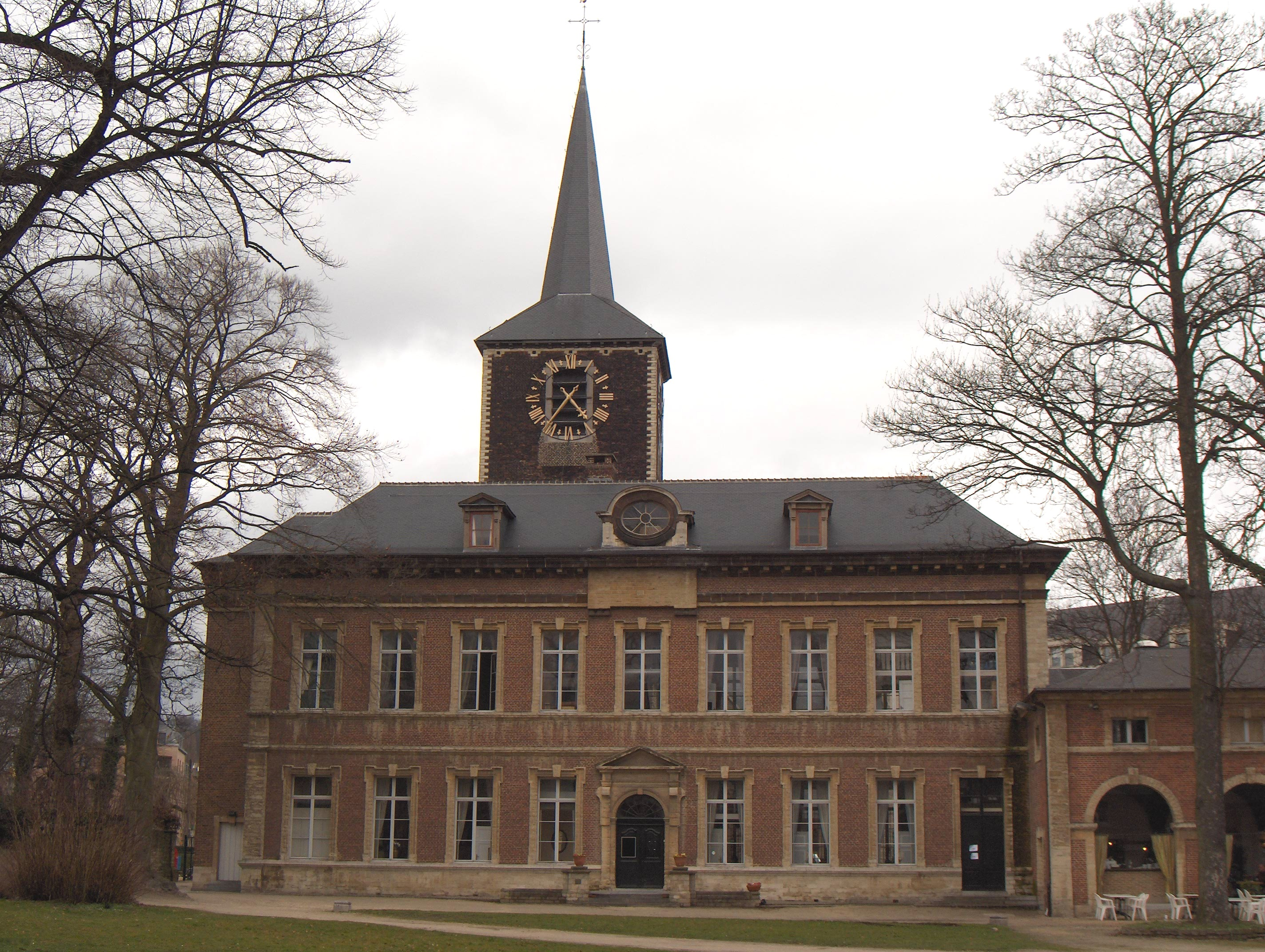 Beschreibung: Vorst (ndl.) - Forest (frz.), ehemalige Benediktinerinnenabtei, im 12. Jh. gegründet, im 18. Jh. nach einem Feuer neu errichtet. Architekt: Laurent-Benoît Dewez. Datum: 26. März 2006 Fotograf: Friedrich Tellberg